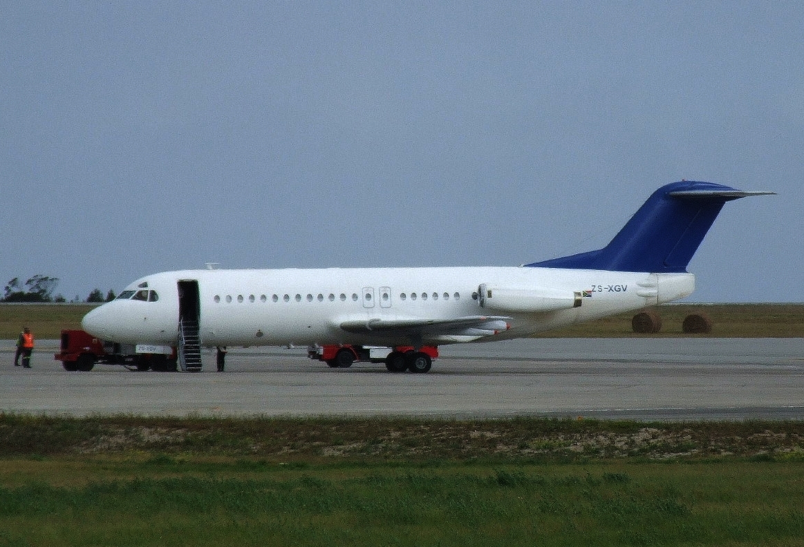 Airquarius F28-4000 ZS-XGV